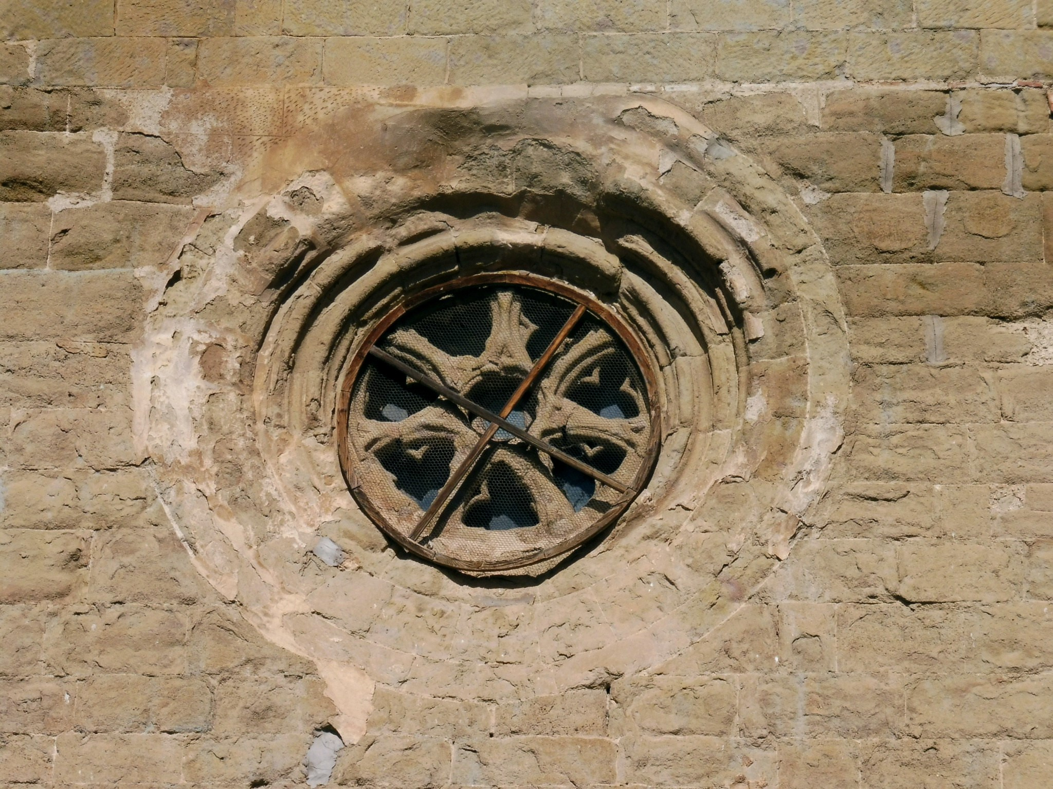 Església parroquial de Sant Vicenç de Menàrguens: ull de bou